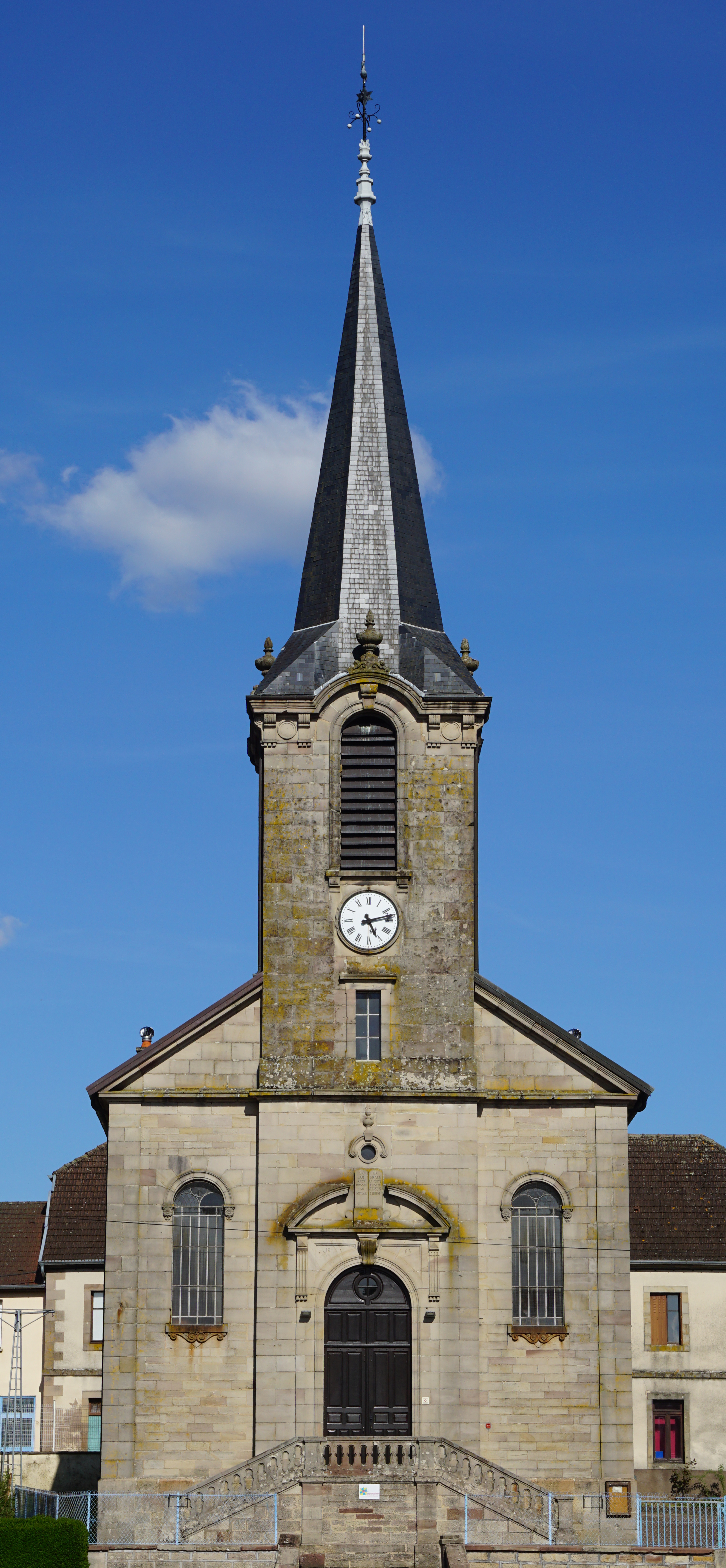 Le temple luthérien de Magny-Danigon.